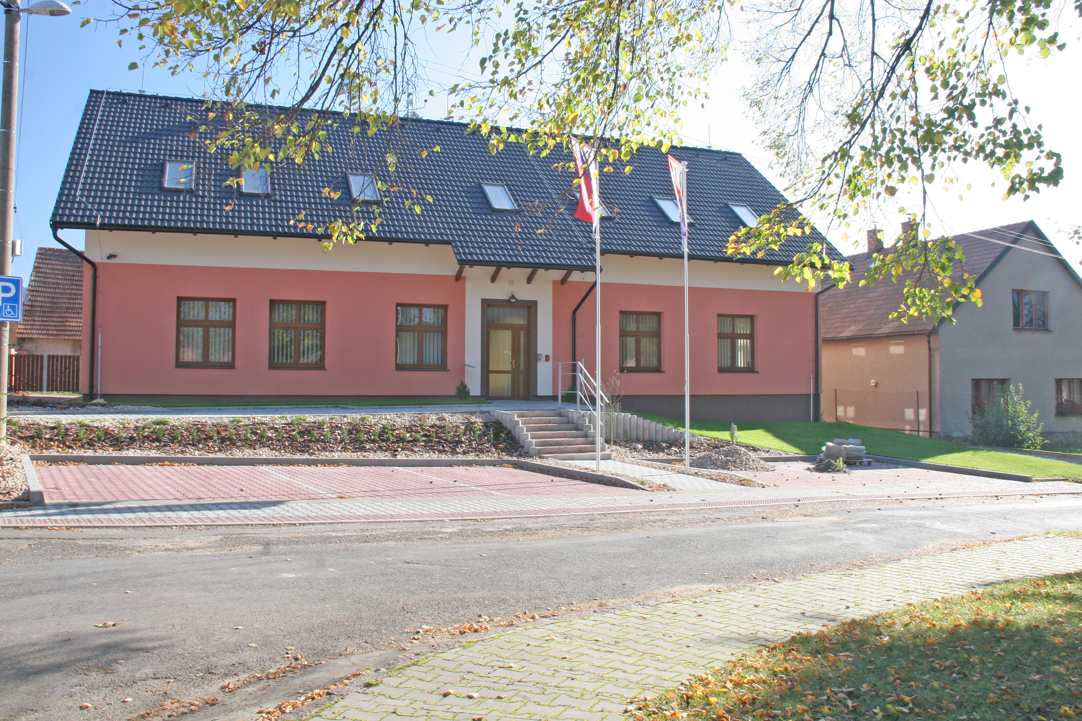 Bousov obecní úřad